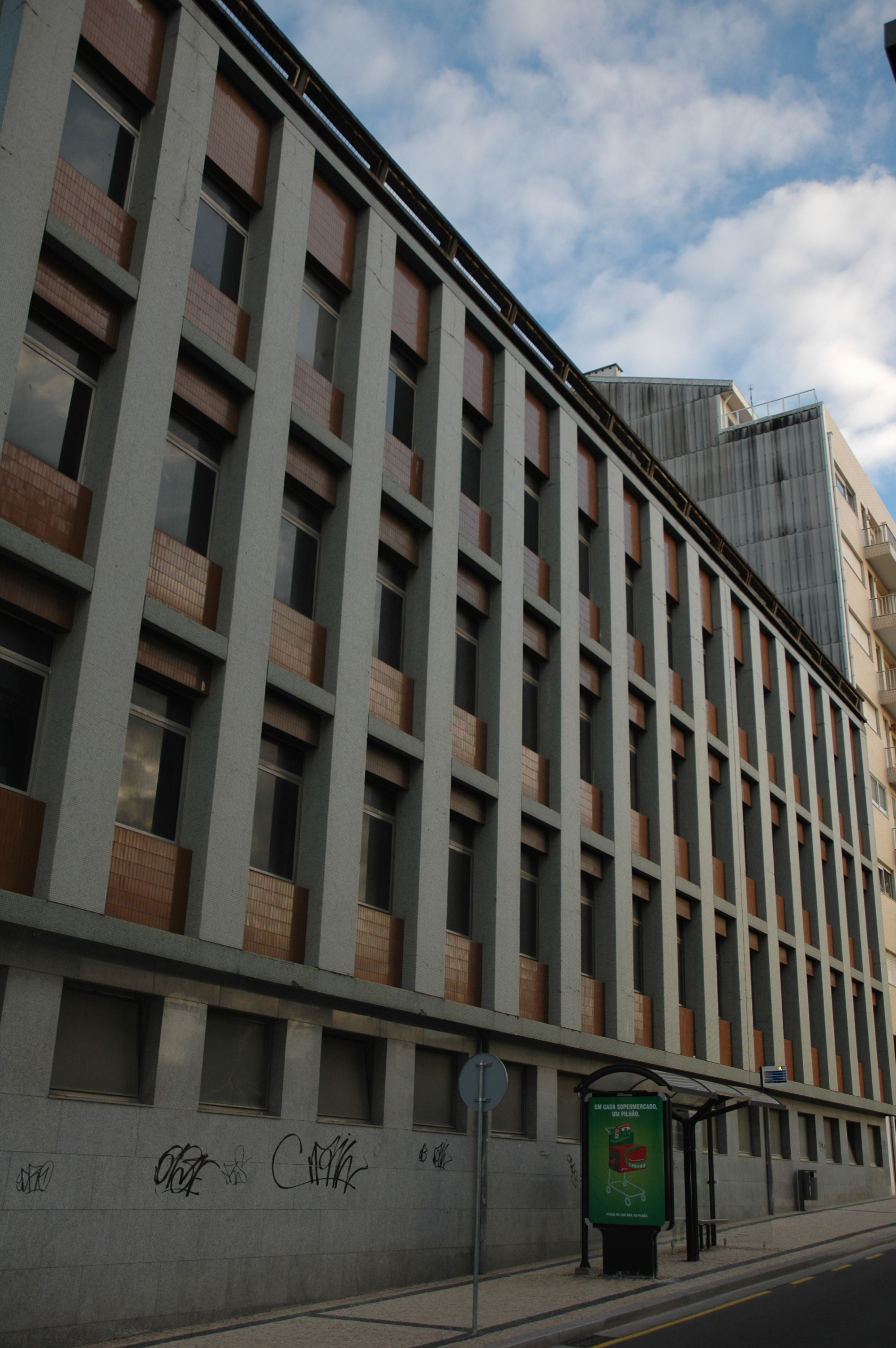 Moagem de V.N. de Gaia na Av. da Républica. Arq. Hargreaves da Costa Macedo